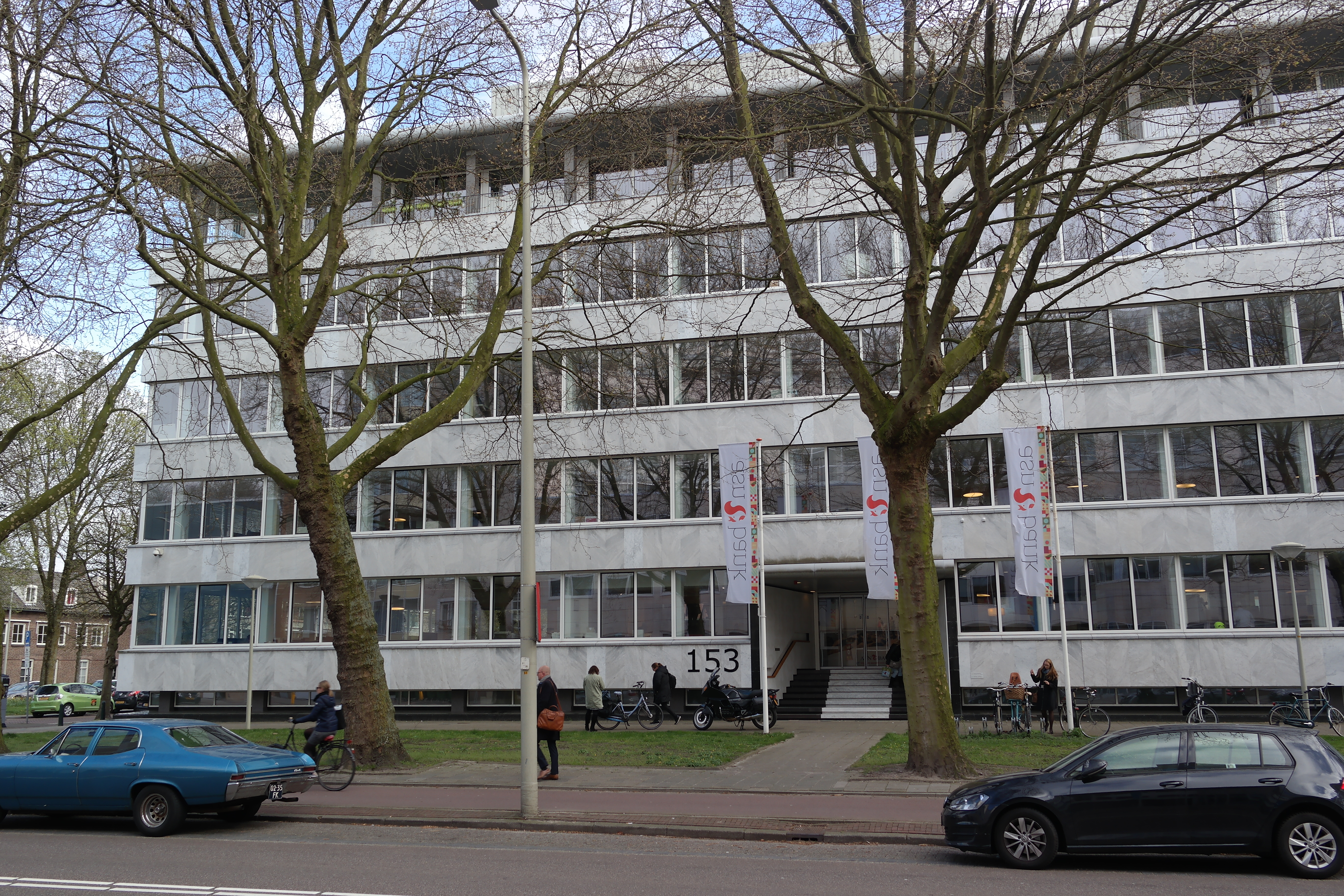 Hoofdkantoor van ASN Bank aan de Haagse Bezuidenhoutseweg.